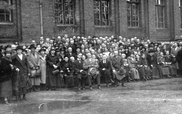 Niemieckojęzyczny zbór Badaczy Pisma Świętego (Świadków Jehowy) w Gdańsku (11 października 1925). W pierwszym rządzie od lewej Wilhelm Scheider, Paul Balzereit, Wilhelm Ruhnau i Ewald Niehuß.